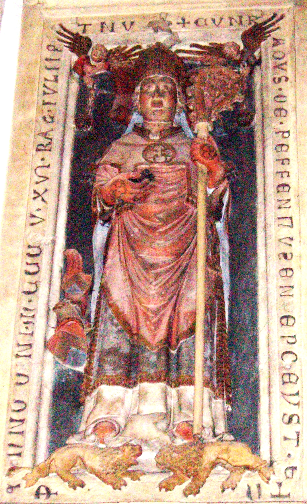 Konrad_von_Pfeffenhausen,_Bischof_von_Eichstätt_1297-1305_Grabdenkmal_im_Dom_zu_Eichstätt